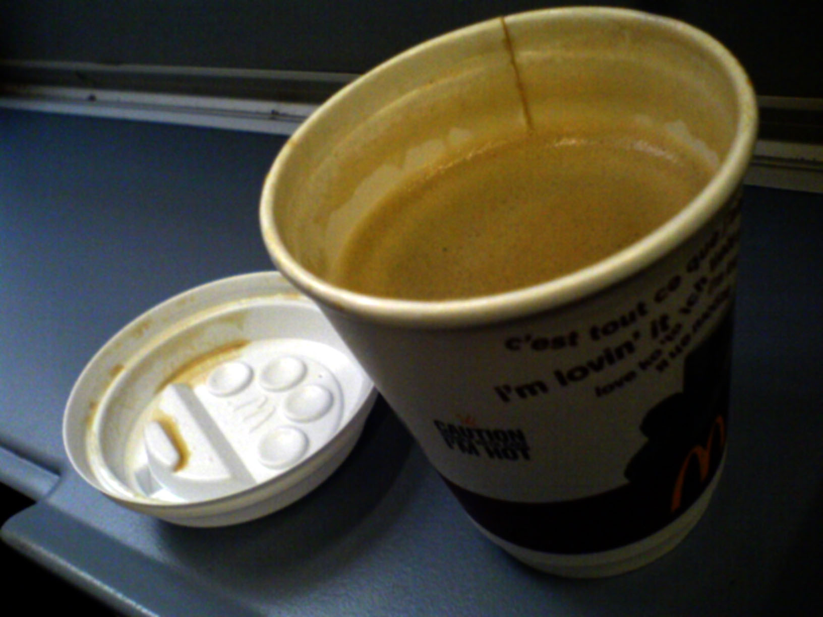 Kaffe